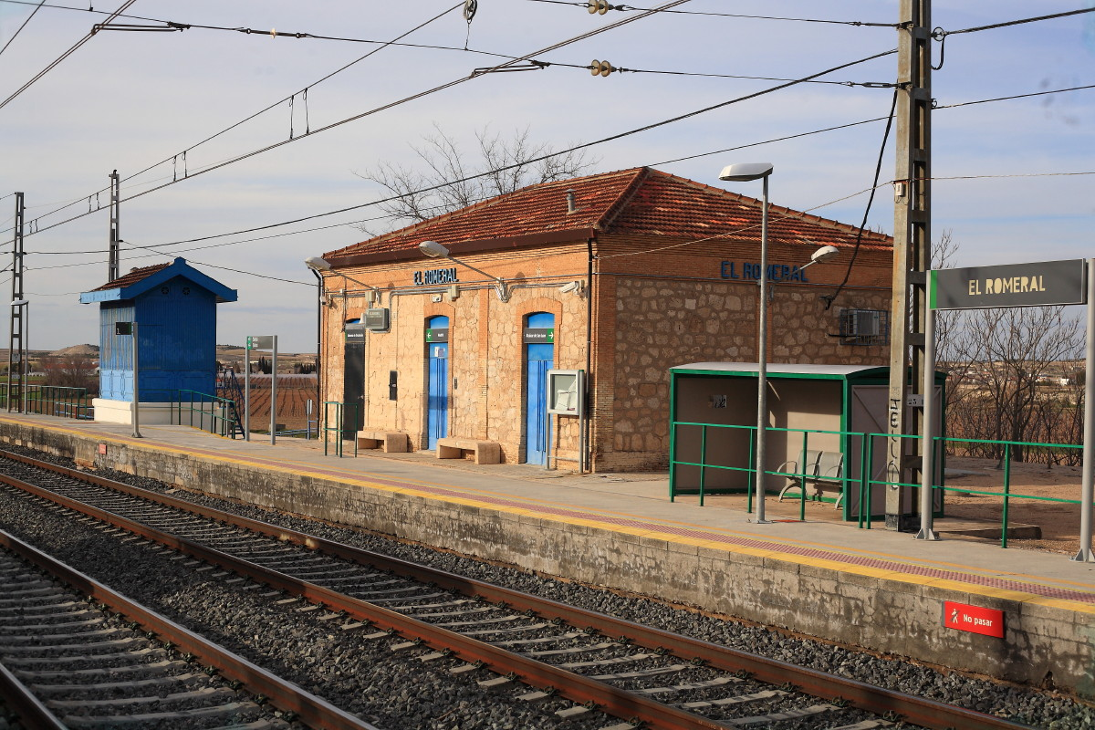 Estación de El Romeral.